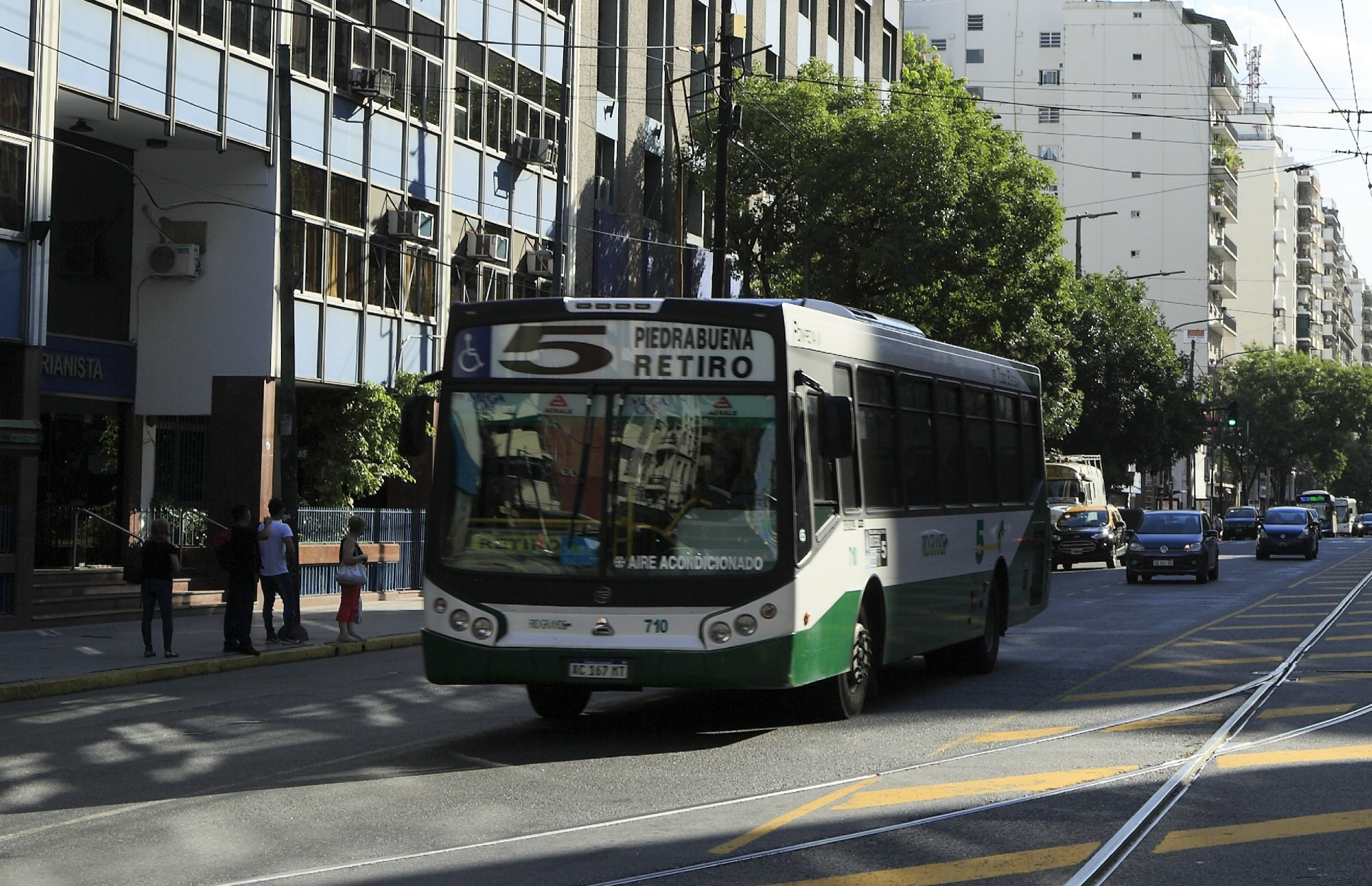 J35 080 Avenida Rivadavia, Zufahrt Bw Polvorin.jpg